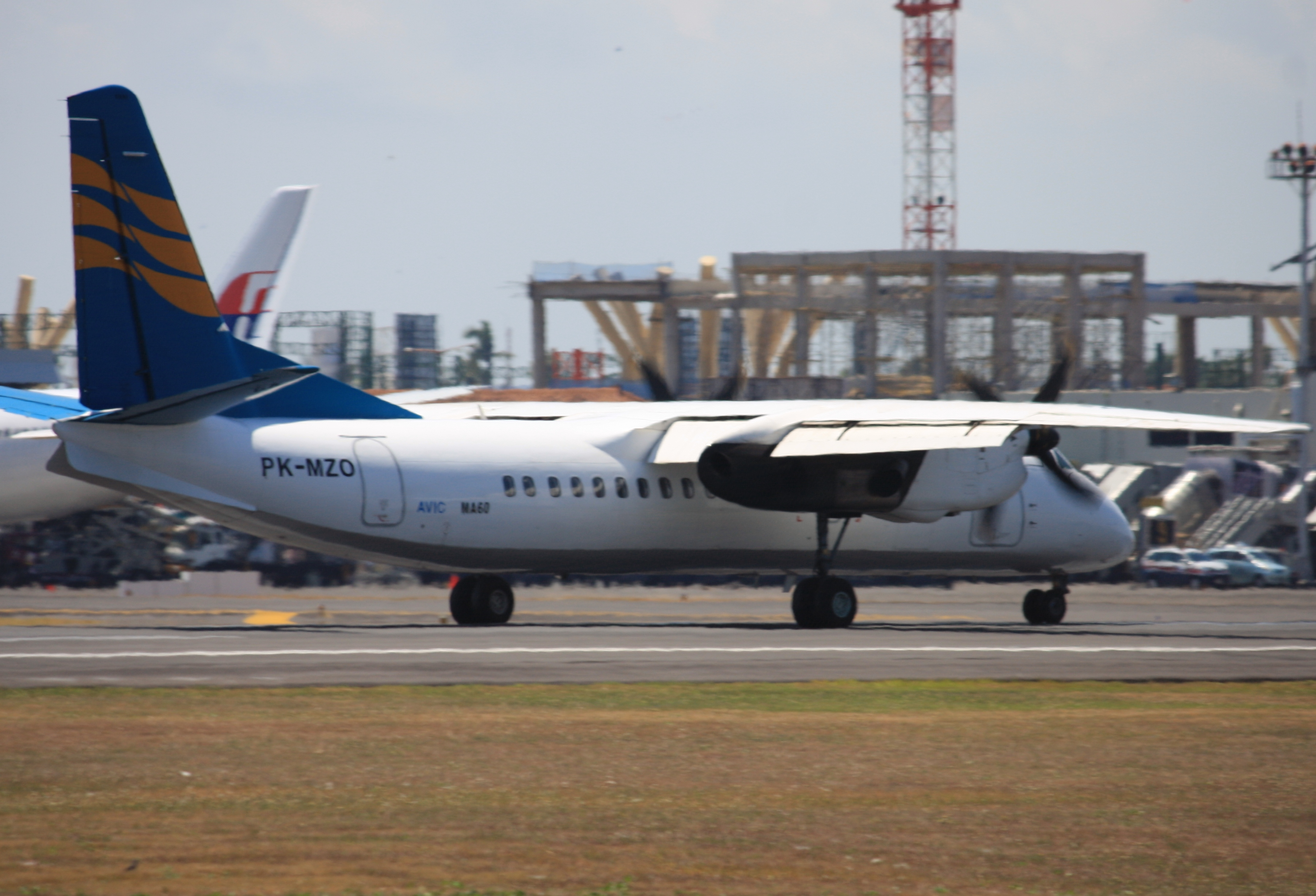 Denpasar / Bali - Ngurah Rai International (DPS / WADD) Indonesia, August 20, 2012.